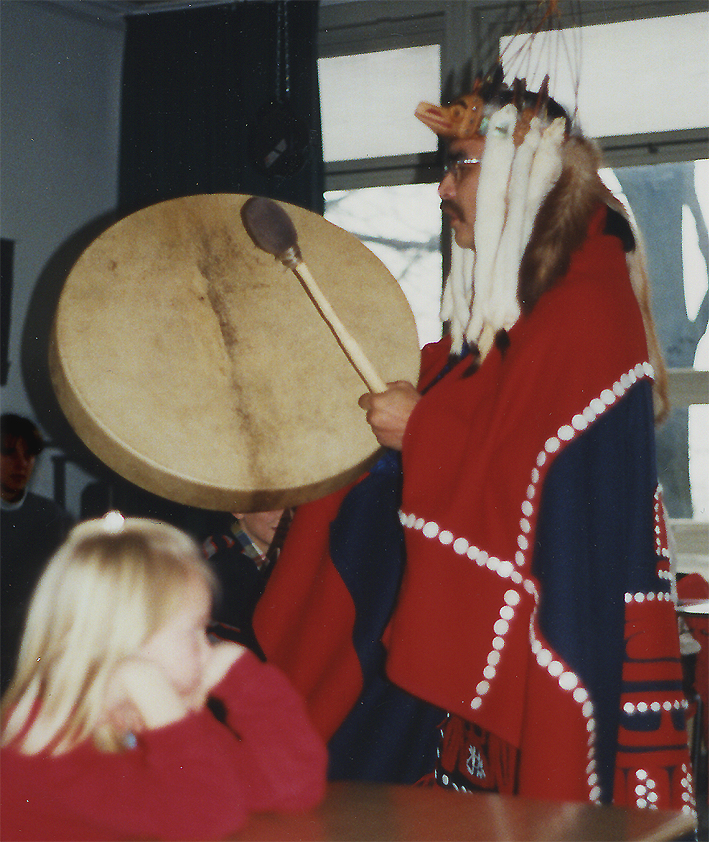 Ed E. Bryant bei einer Veranstaltung in Wuppertal